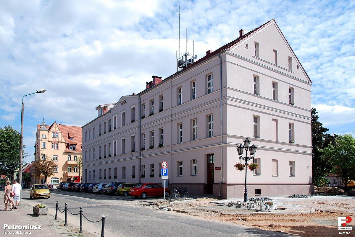 Wolsztyński Ratusz oglądany z ulicy Poznańskiej. W prawym dolnym rogu widoczne prace przy rewitalizacji wolsztyńskiego Rynku.